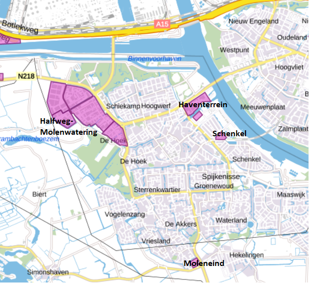 Bedrijventerreinen Spijkenisse 2020 - kaart